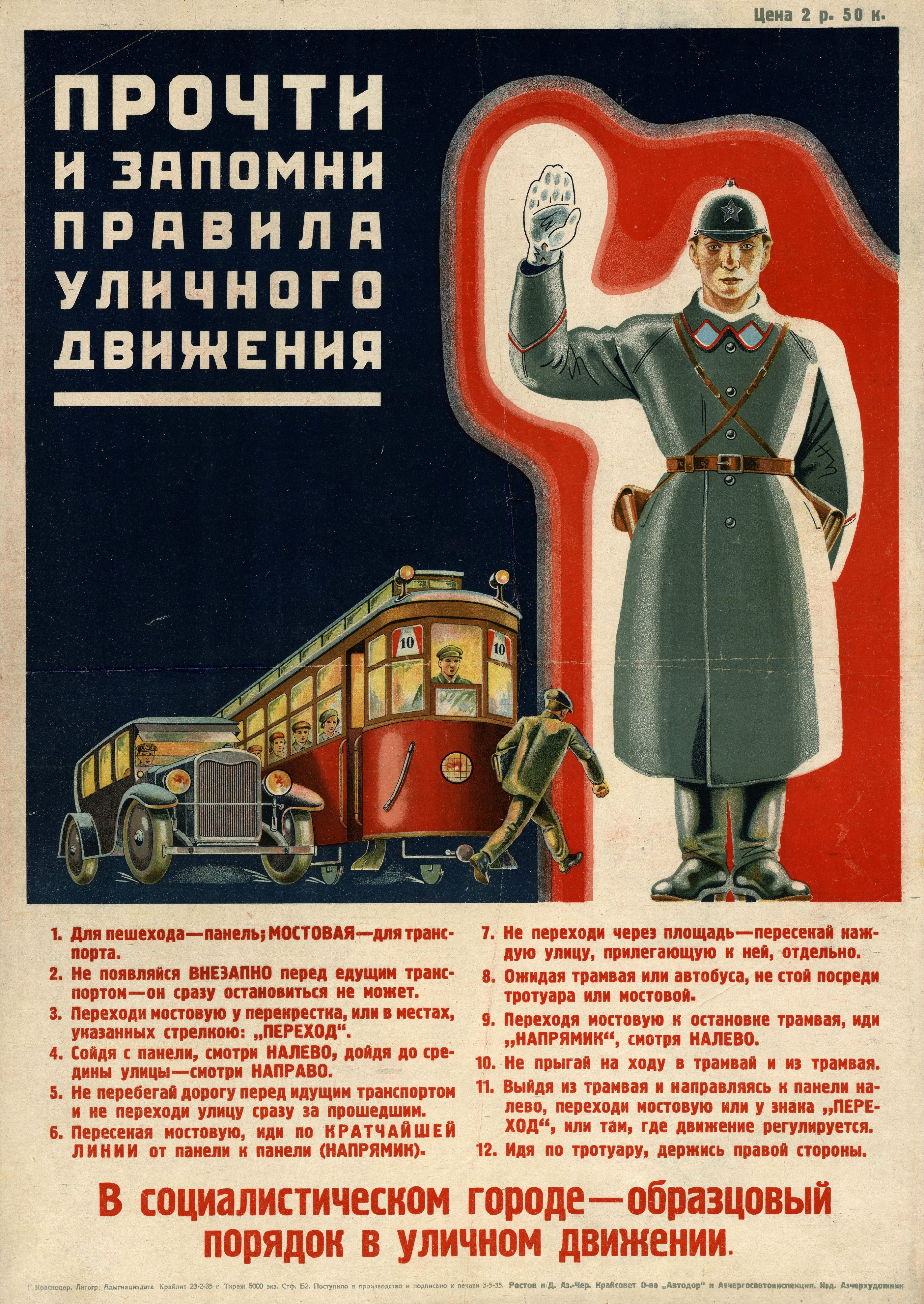 Прочти и запомни правила уличного движения : В социалистическом городе — образцовый порядок в уличном движении : [плакат] / Азчерхудожники. — Ростов-на-Дону : Азово-Черноморский крайсовет общества «Автодор» ; Ахчергосавтоинспекция, 1935 (Краснодар : Литография Адыгнацииздата). — Цветная литография, 1 лист, 71 × 50 см. — 5000 экз.